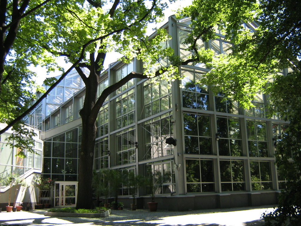 Budynek Palmiarnii w Łodzi